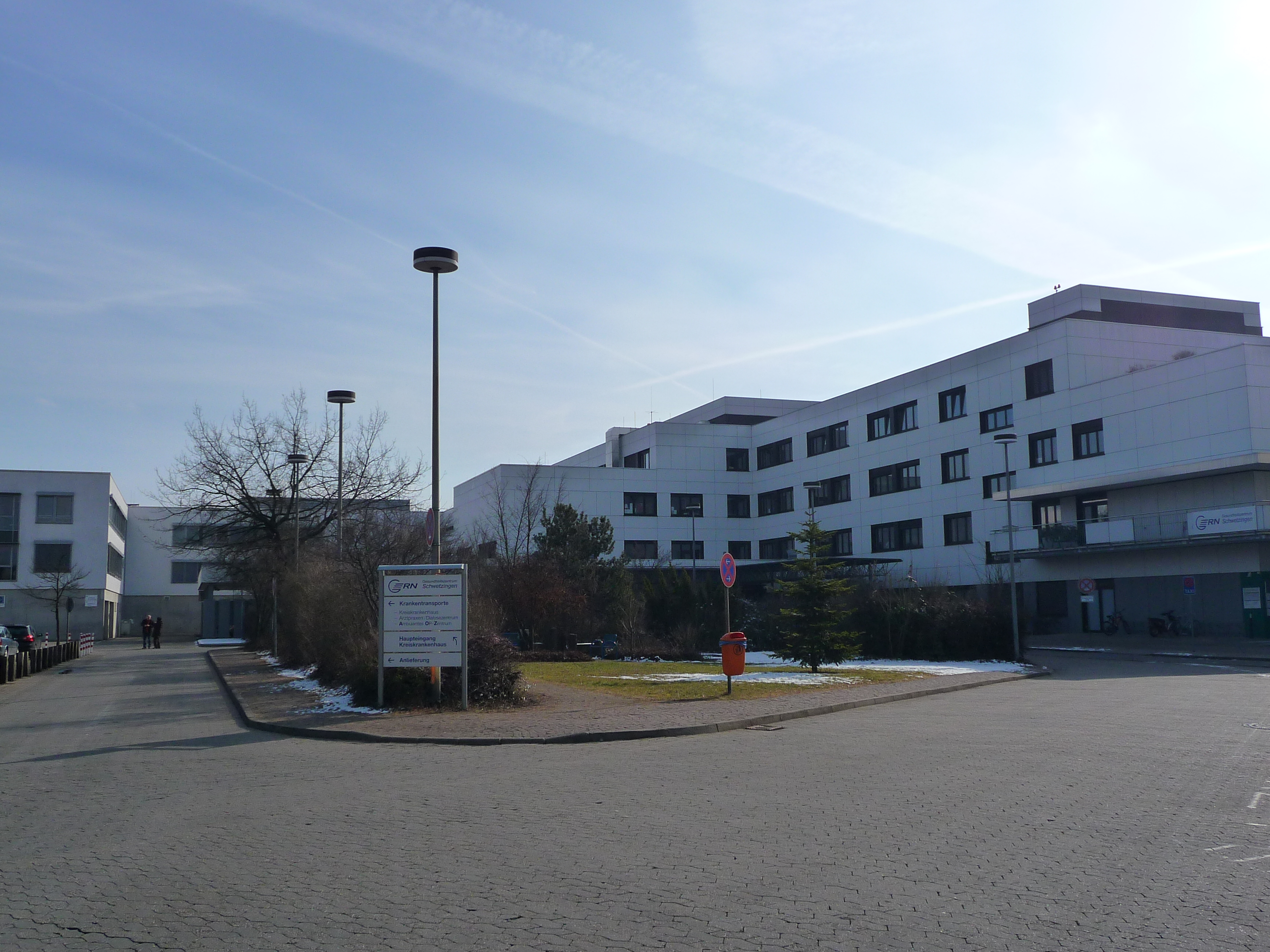 GRN-Klinik in Schwetzingen (Rhein-Neckar-Kreis)